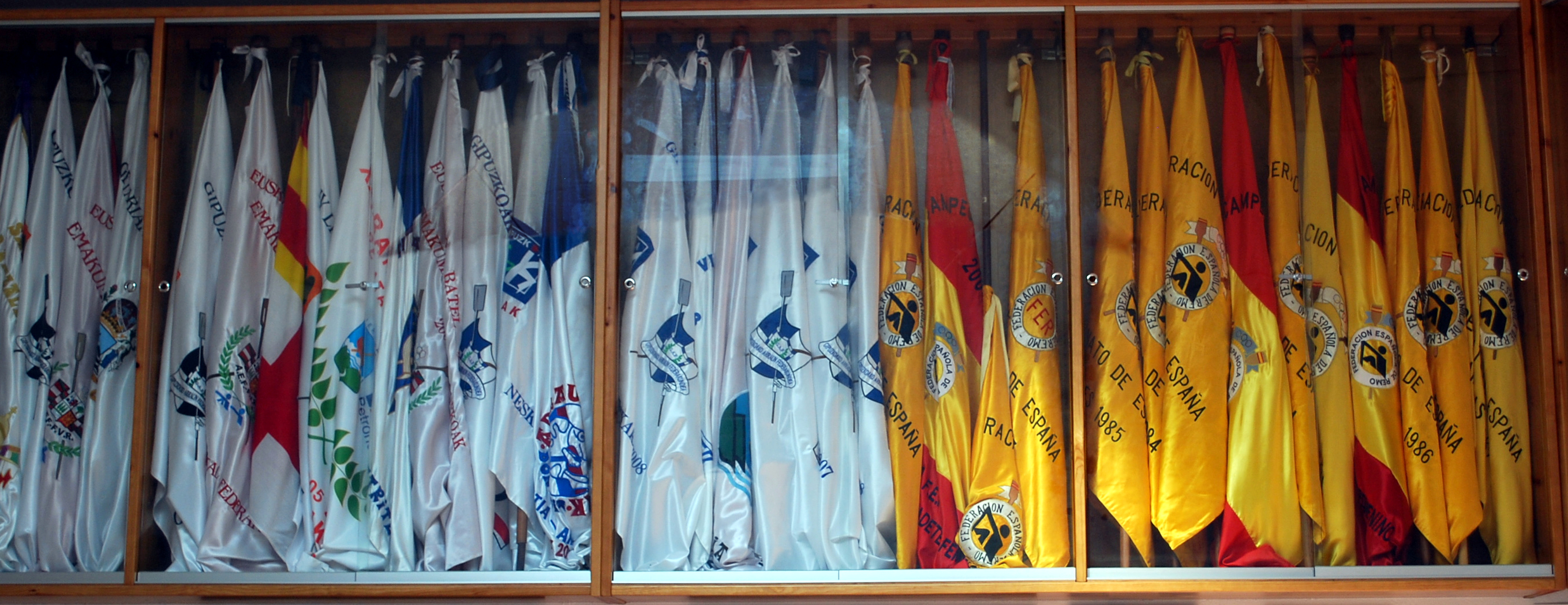 Drapeaux gagnés par Zumaia (Guipuscoa)